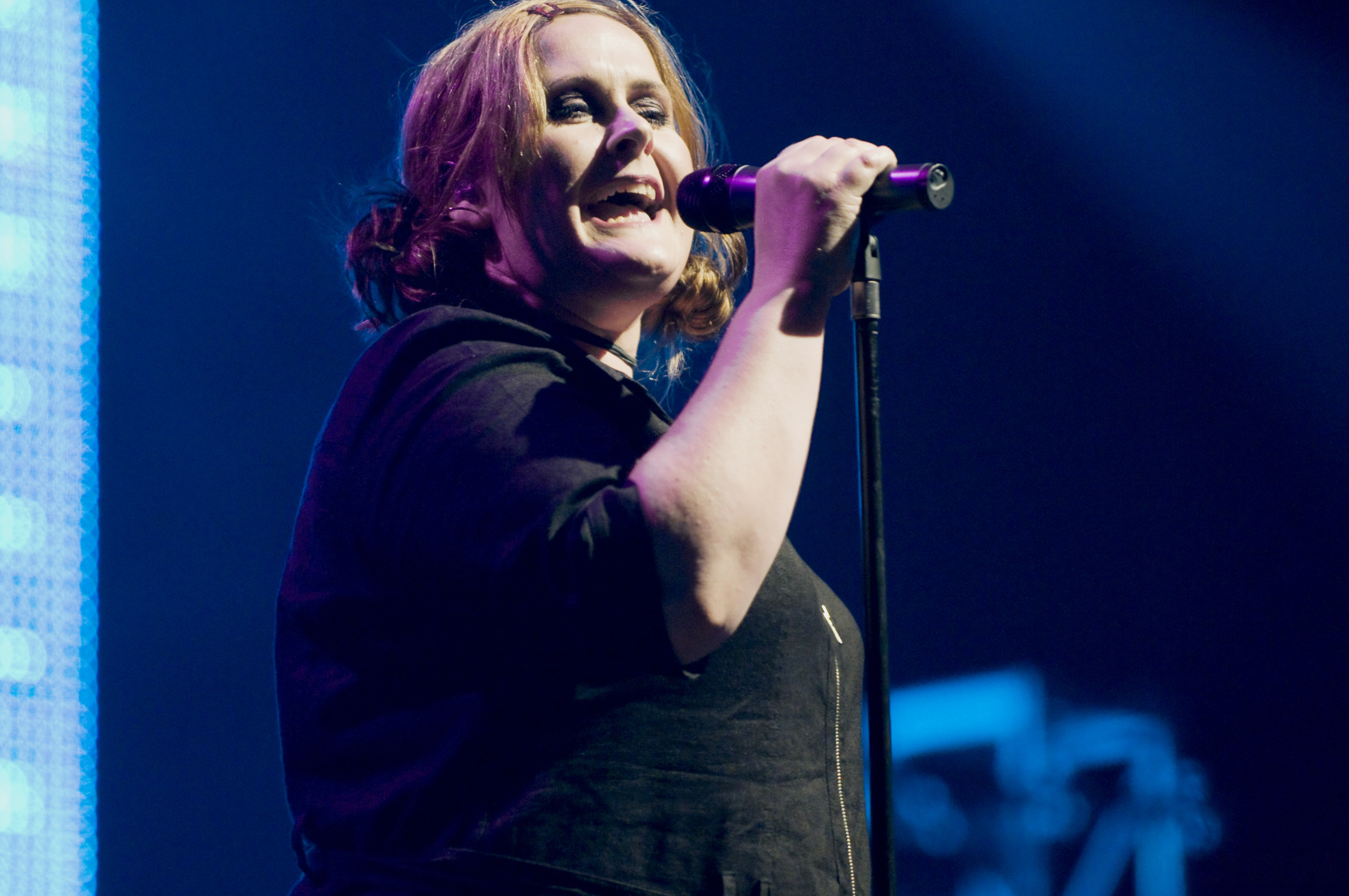 Yazoo (band)